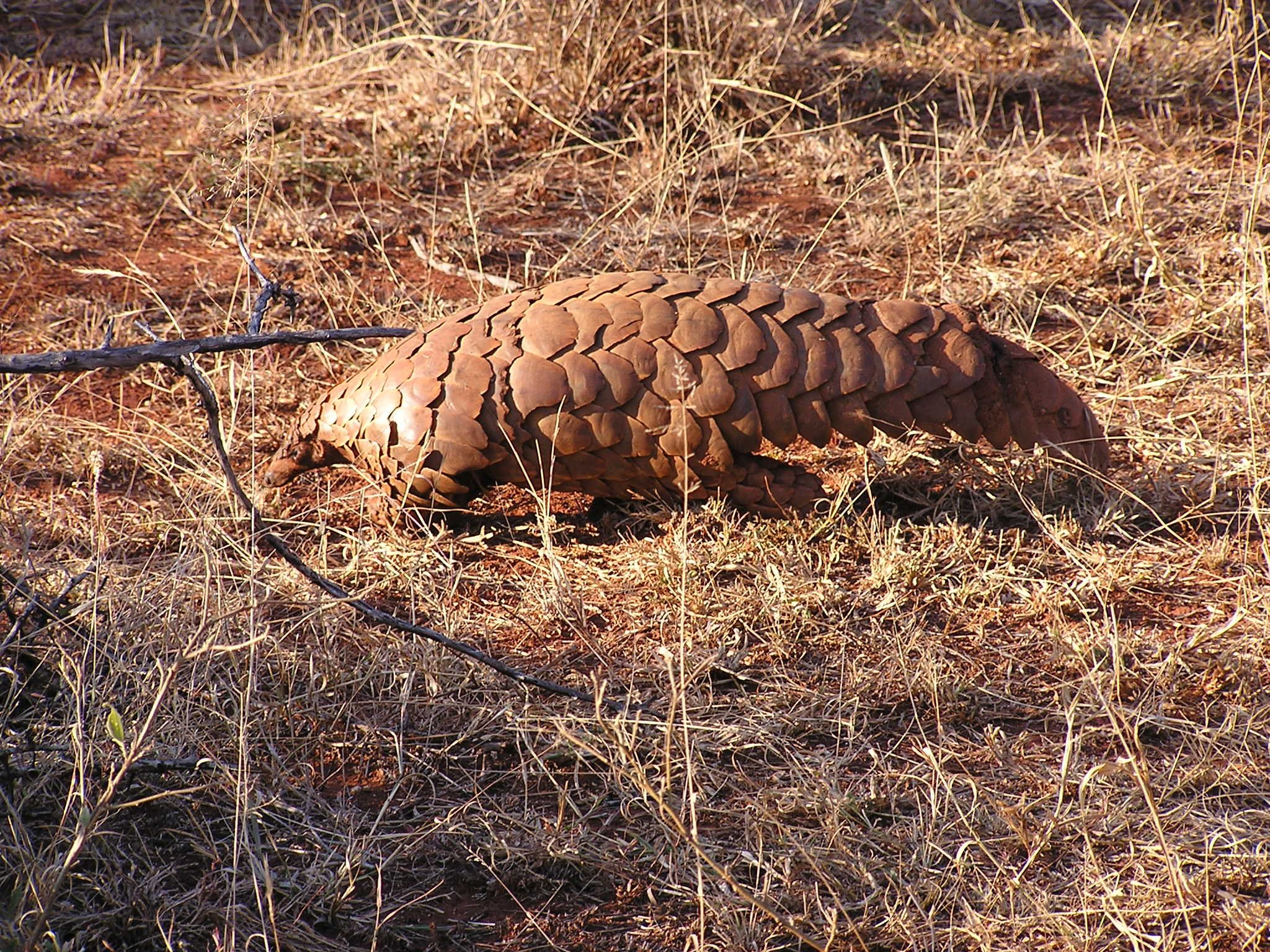 Steppenschuppentier (Manis temminckii), Madikwe Game Reserve, Südafrika